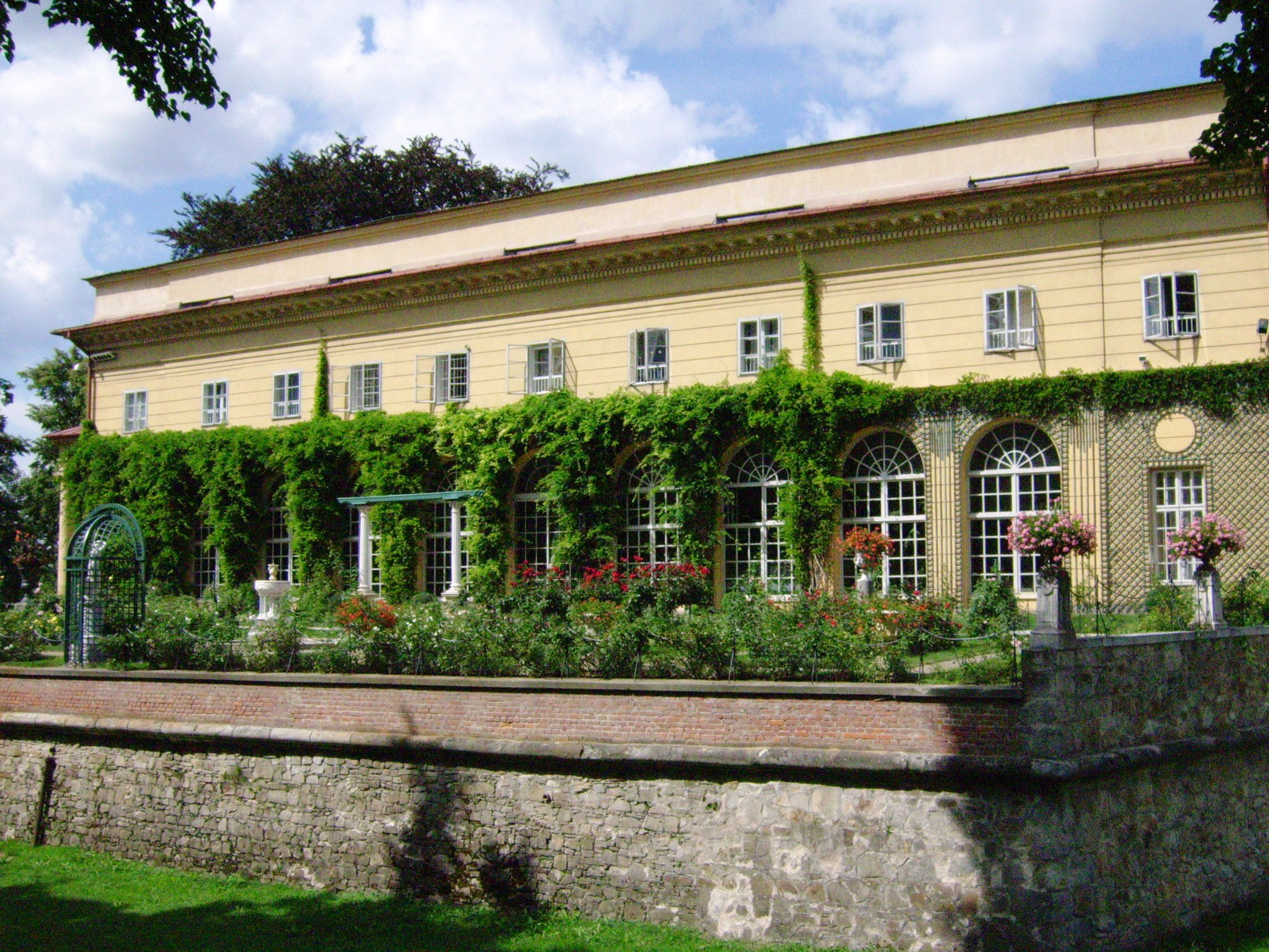 Zespół pałacowy w Łańcucie.